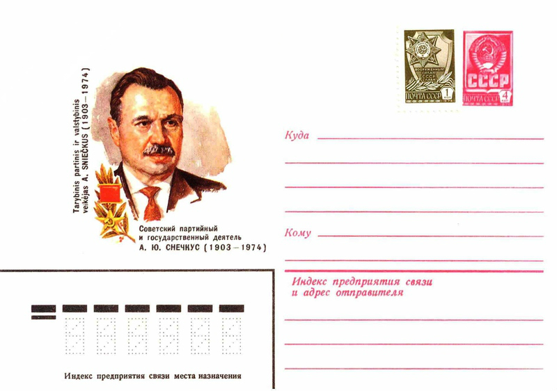 Художественные маркированные конверты 1982 года.